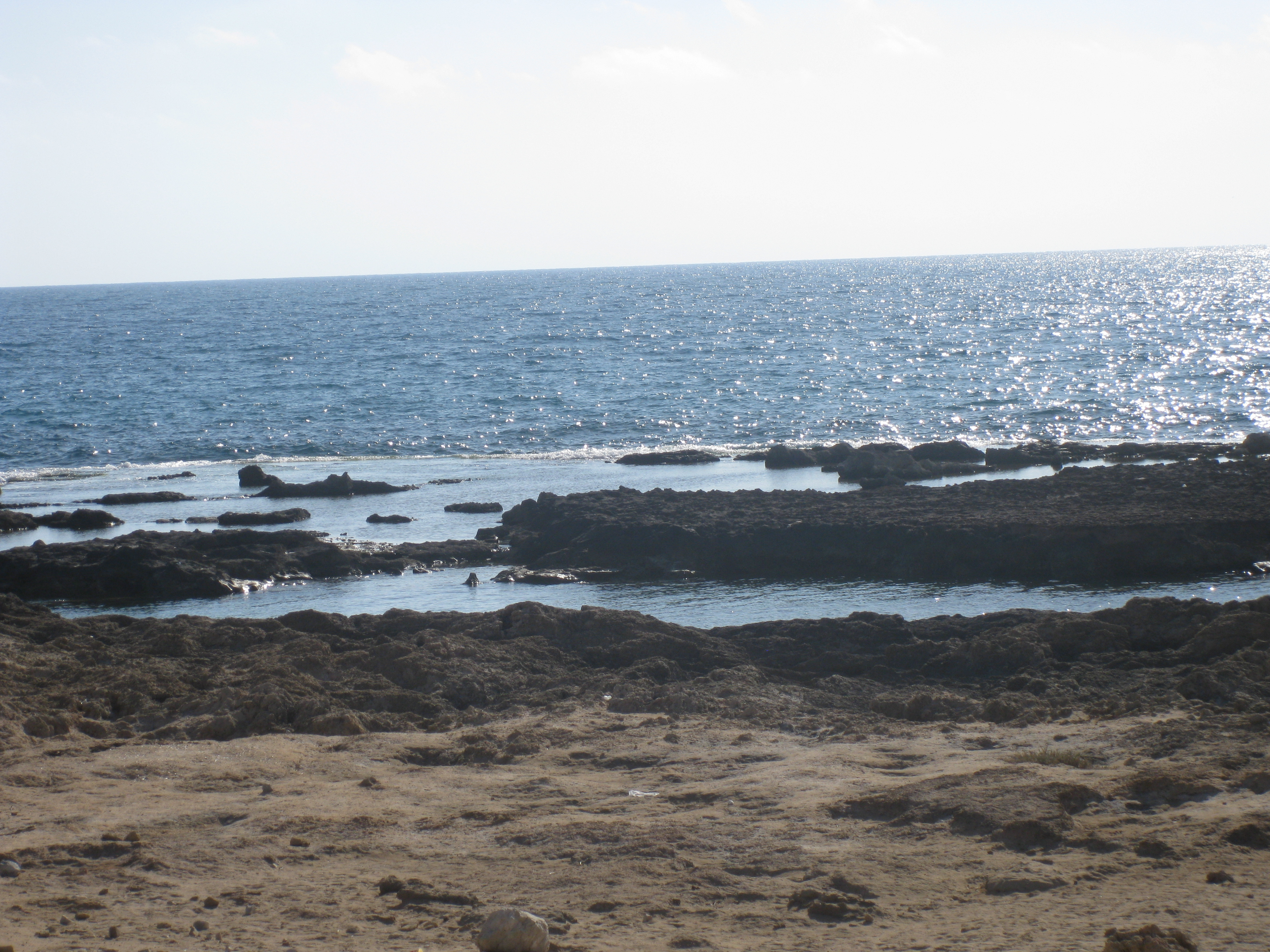 Achziv Beach חוף אכזיב